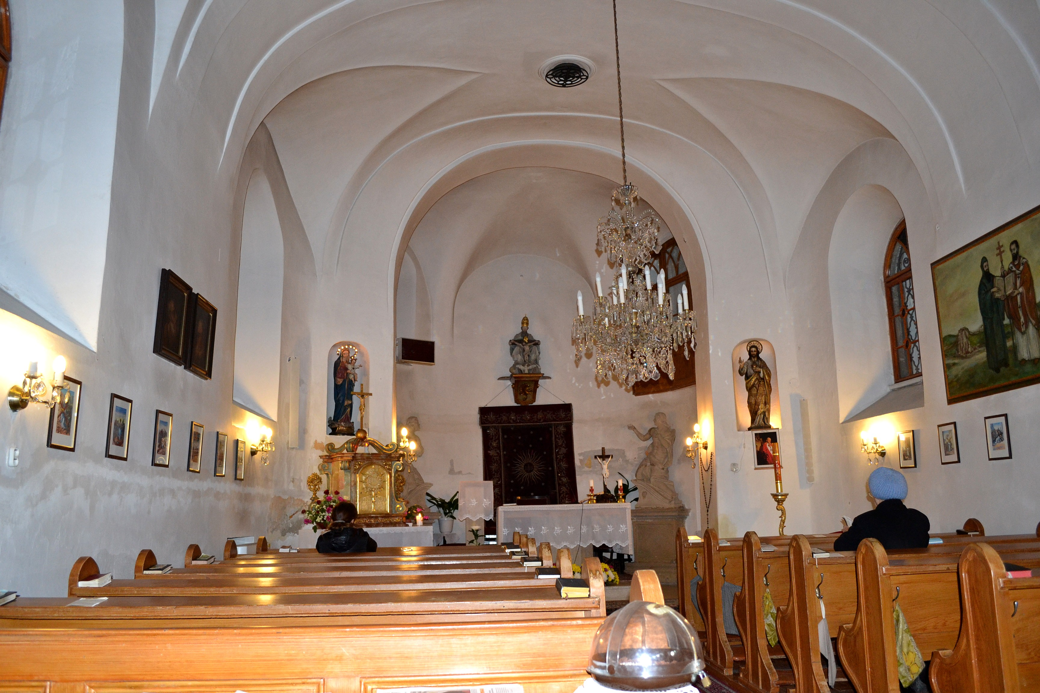 Pohľad do interiéru kostolíka